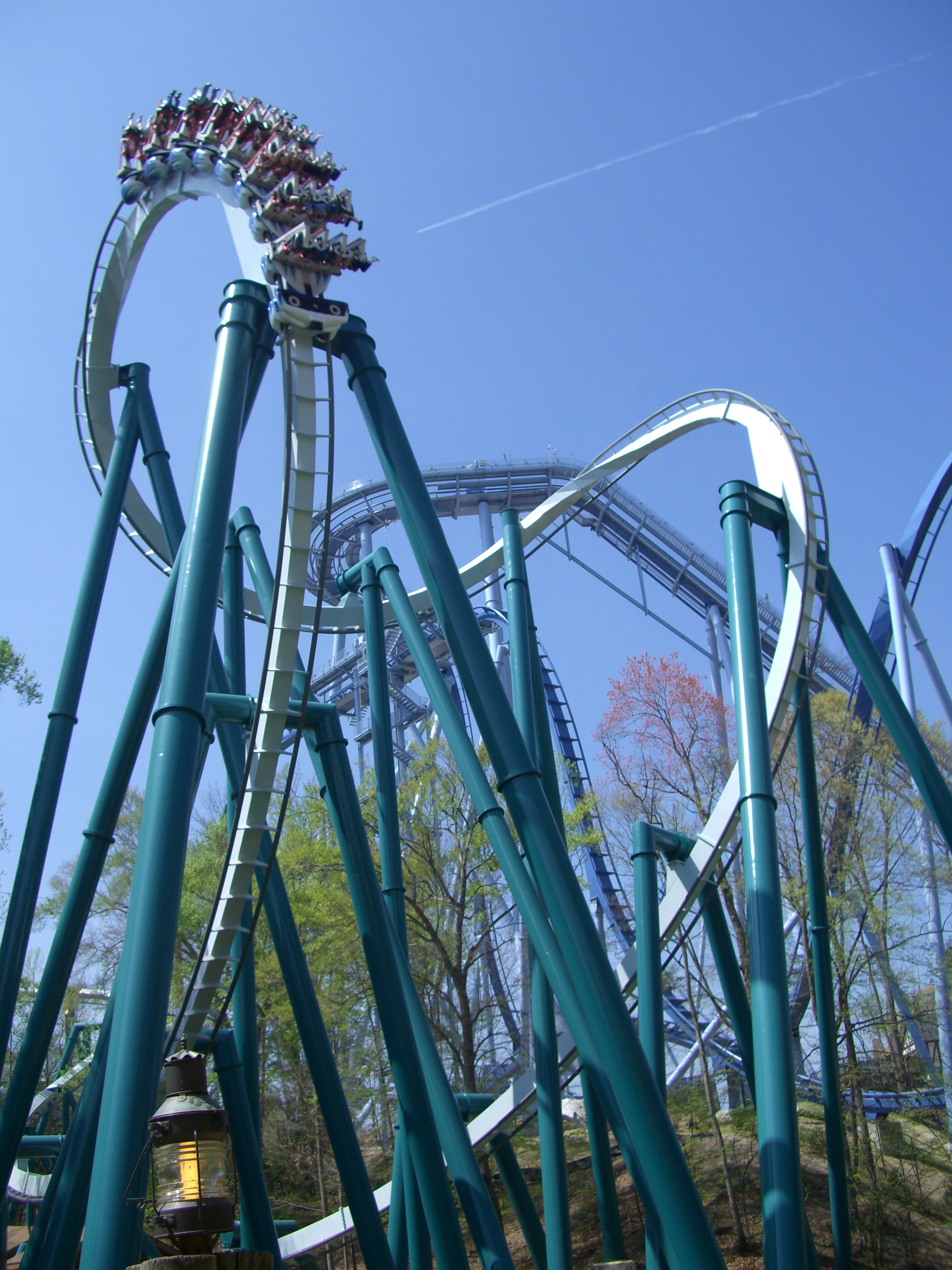 Alpengeist , montagnes russes à Busch Gardens Europe